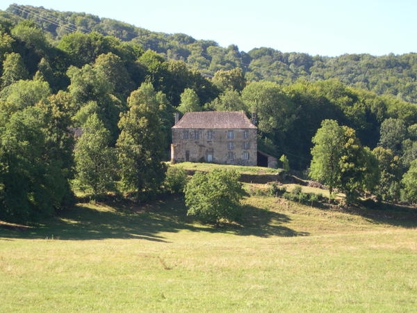 chateau d'Estang à Marmanhac (15) France